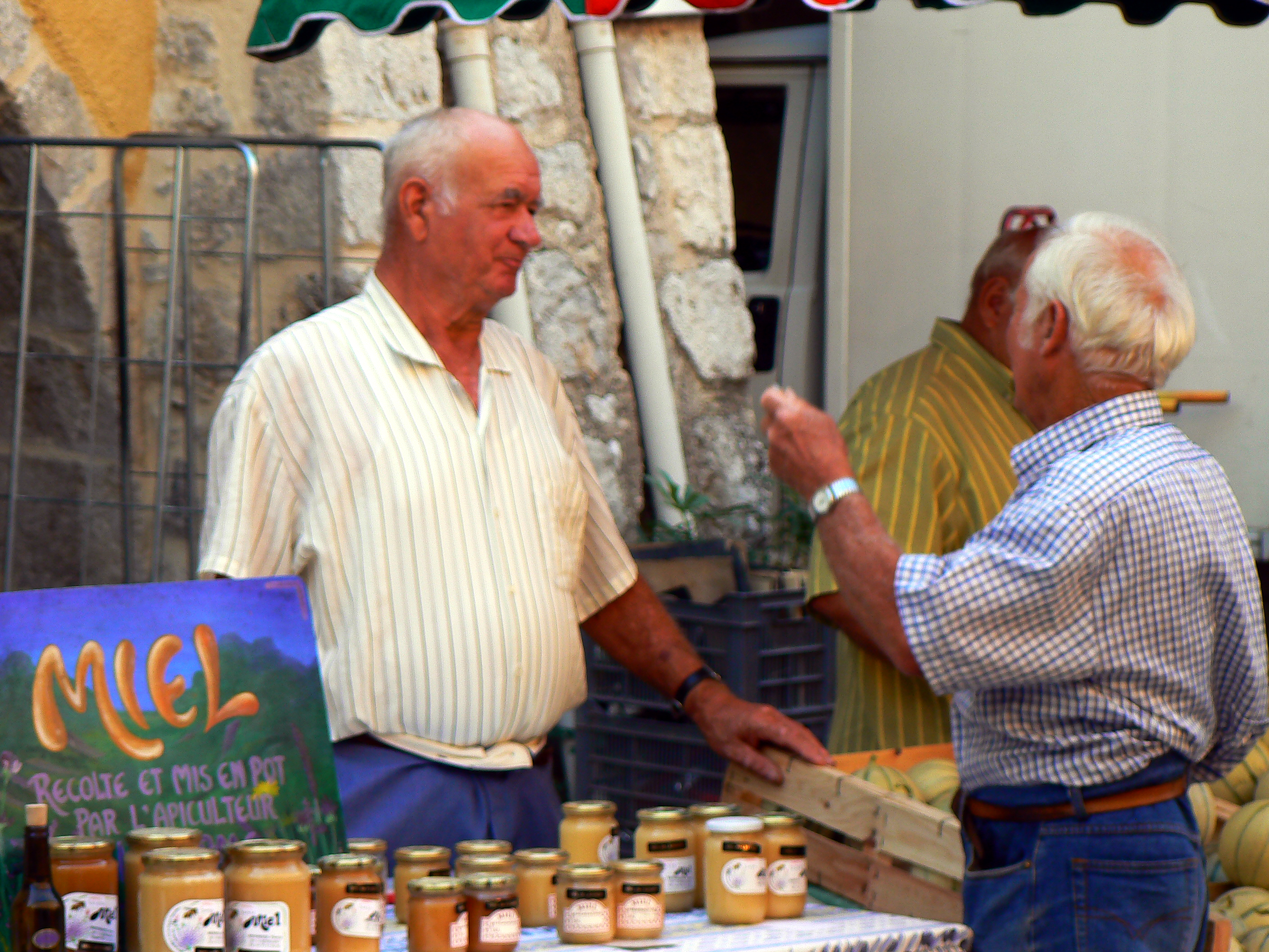 Apiculteur vendant son miel sur le marché de Buis-les-Baronnies